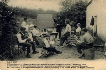 Carte postale d'un cour d'esperanto à la Communauté communiste-libertaire "L'Expérience" de Stockel puis Boitsfort (Bruxelles) - 1905-1908.